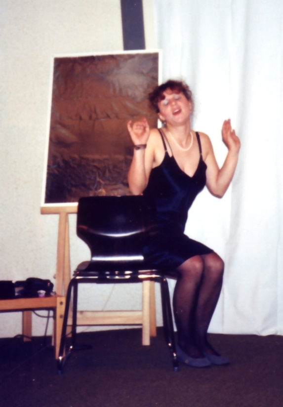 Judith Jackson en la rolo de Maggie Pollitt, en provludo por esperantlingva prezento de la teatraĵo Kato sur varmega ladotegmento de Tennessee Williams, kiu premieris en la IJK kaj UK 1989